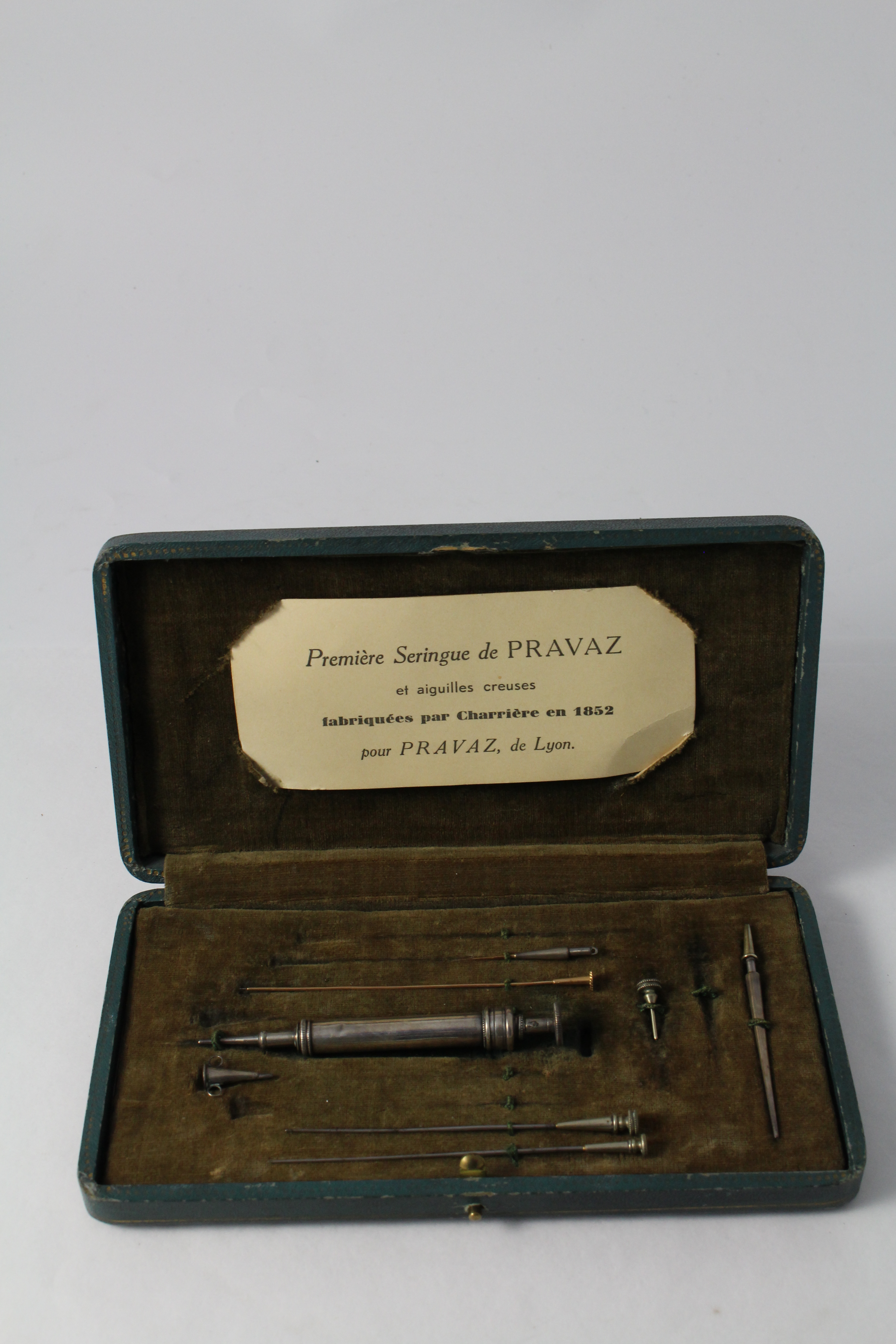 N° Inv. collection musée HCL - 2007.0.2181.M 50 Fabricant : Charrière 1852